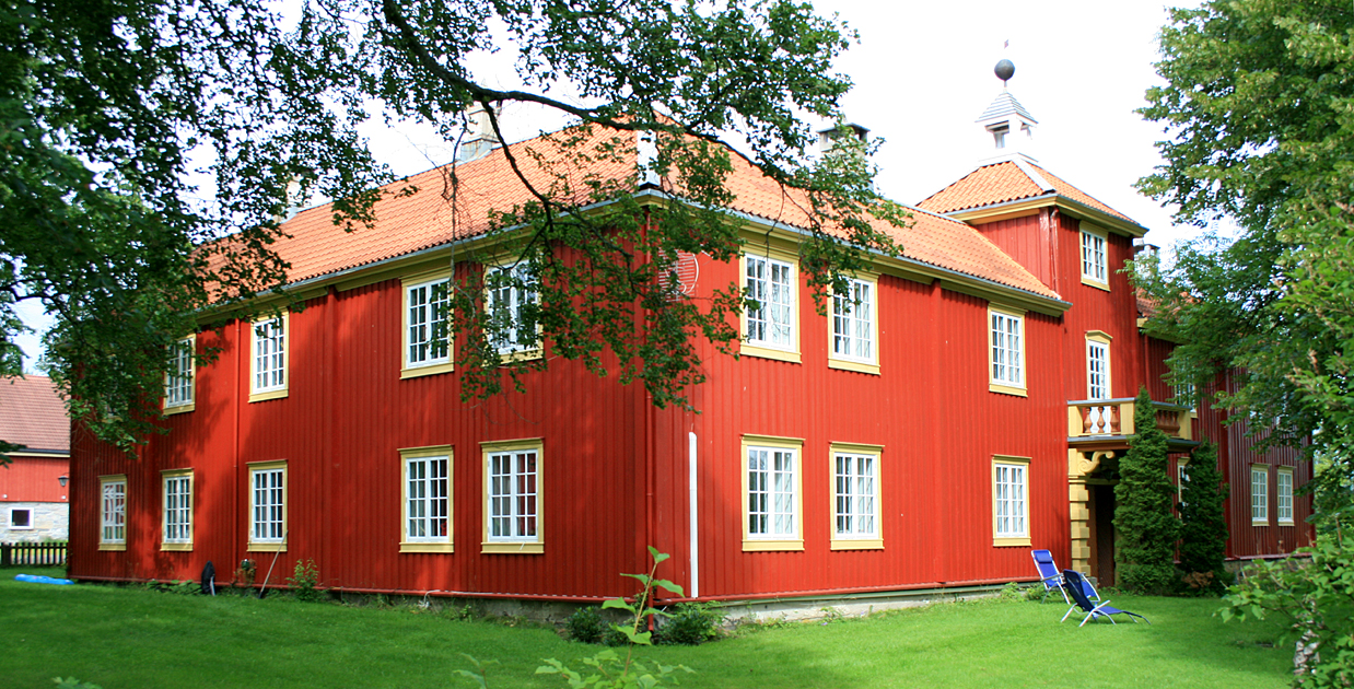 Vinje prestegard, Snåsa. 1700-tallet. Freda.